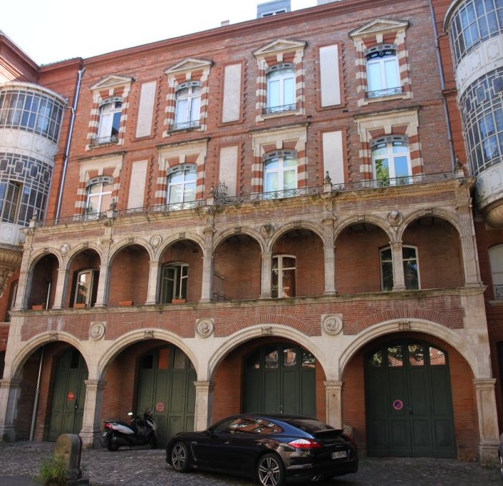 Hôtel Jean de Pins à Toulouse